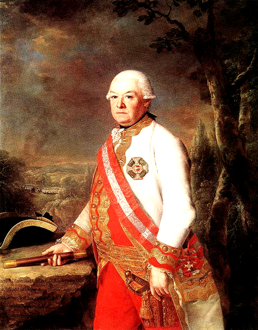 Futaki gróf Hadik András (németül: Andreas Reichsgraf Hadik von Futak; Csallóköz, 1710. október 16. – Bécs, 1790. március 12.) magyar huszártábornok, császári tábornagy (Feldmarschall), földbirtokos, politikus. Ükunokája: Hadik János Unokája: Hadik Ágoston